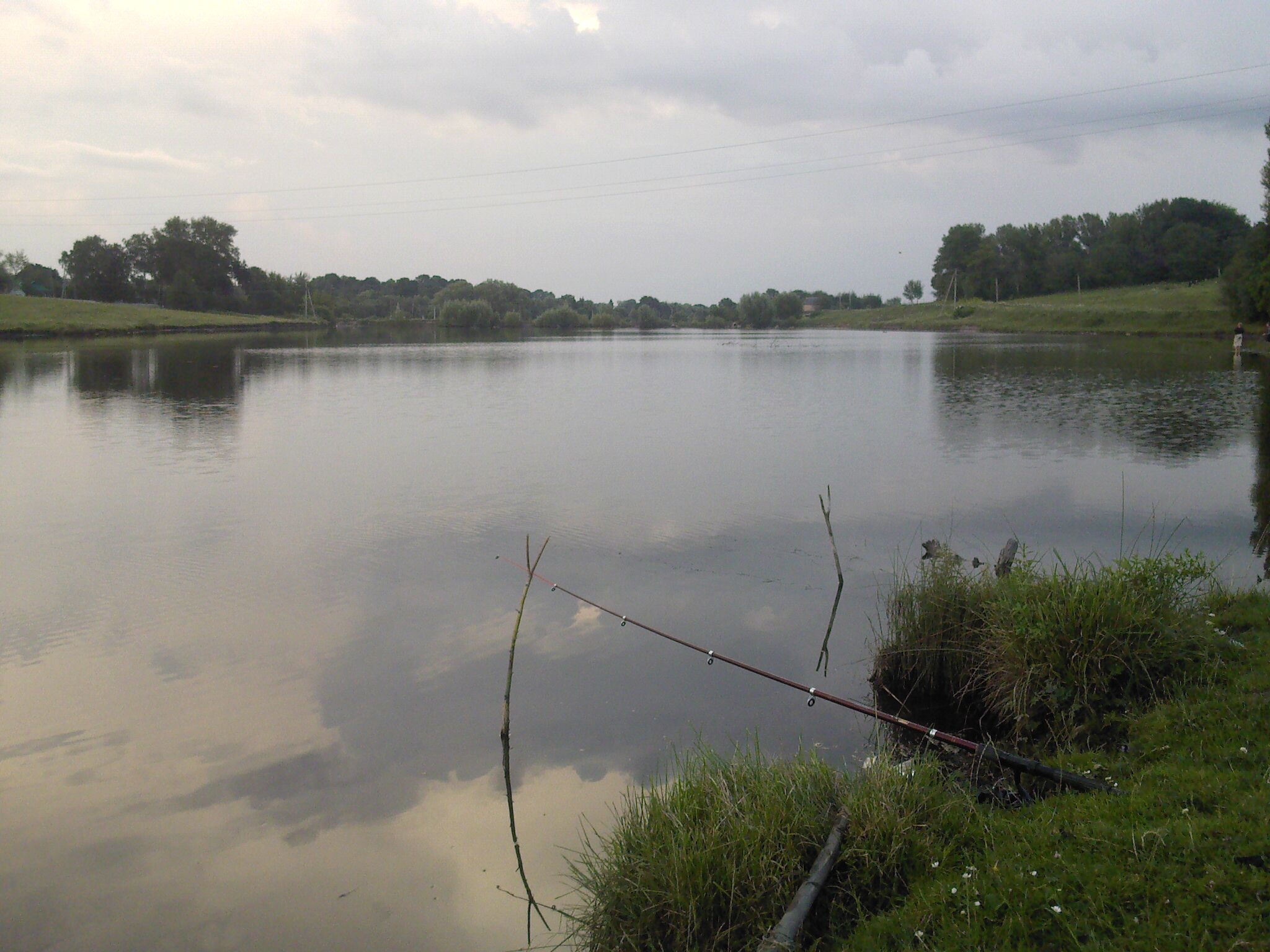 Базалія. Ставок «Поташня»